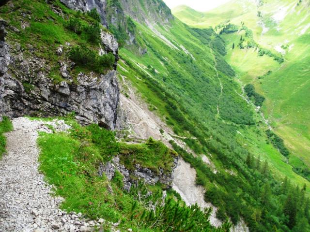 Der Schrofenpass zwischen Oberstdorf und Warth